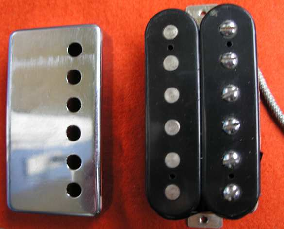 A humbucker element that i have cut loose from its cover